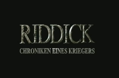 Screenshot des Films Riddick